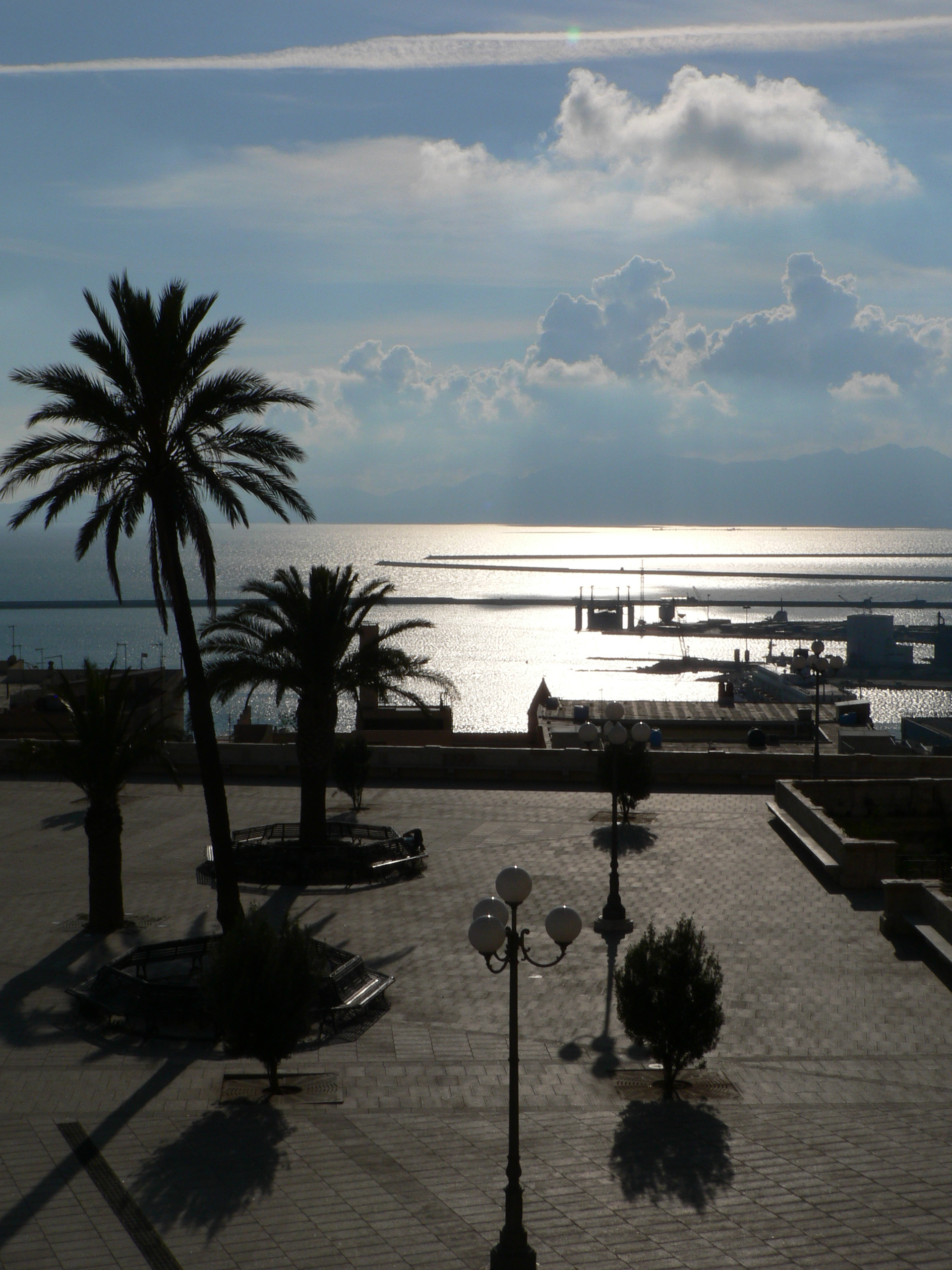 Cagliari, Sardegna, Italia